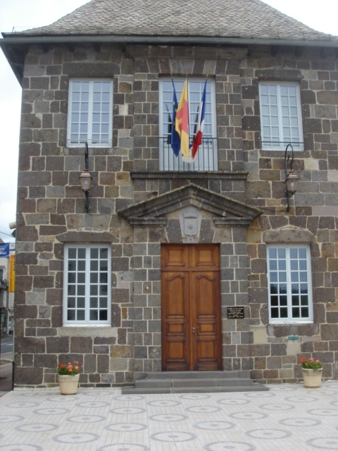 Mairie de Vic-sur-Cère (15)